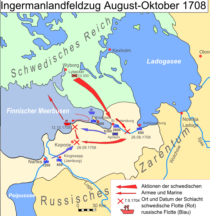 Ingermanlandfeldzug von August bis Oktober 1708, Großer Nordischer Krieg